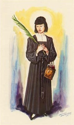 Magdalene of Nagasaki